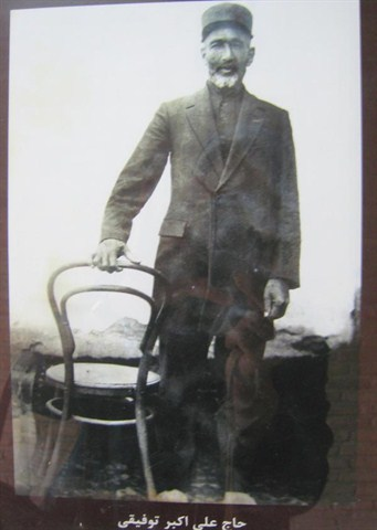 تۆرکجه: عَلَکبَرخان توفیقی، زنجان بلدیه باشقانی، و پالتاریوما بناسینین قوروجوسو Ələkbarxan Tofiqi, Zəncan Bələdiyyəsi başqanı, və PaltarYuma tikintisinin qurulmağına əmr verən